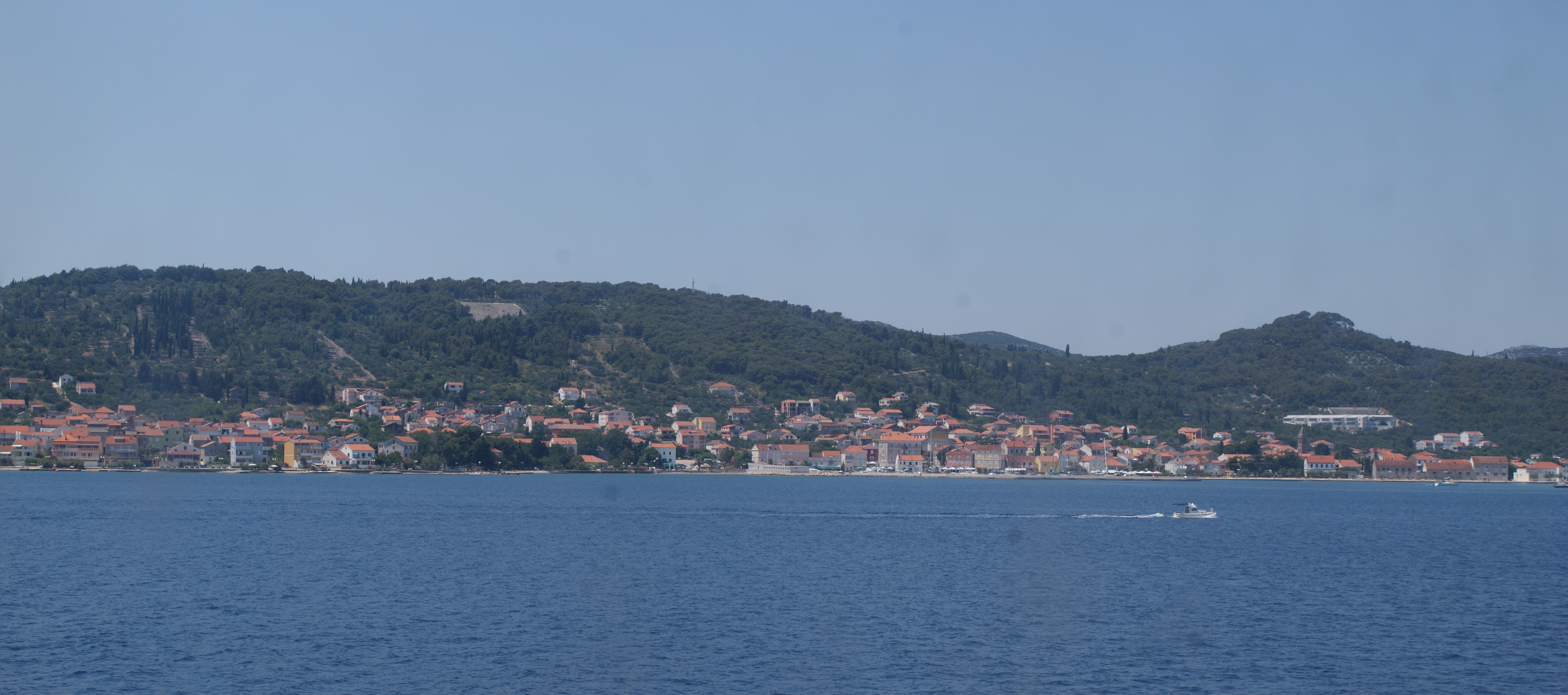 Preko auf der Insel Ugljan vom Meer aus gesehen